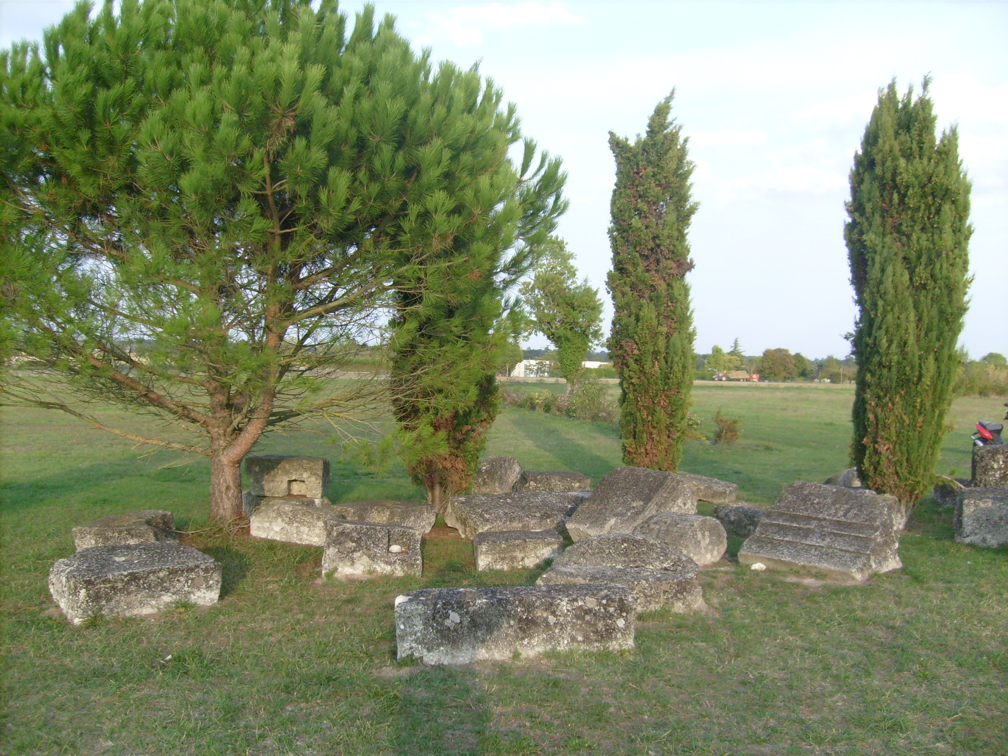 Ruines romaines à proximité du théâtre des "Arènes" de Thénac